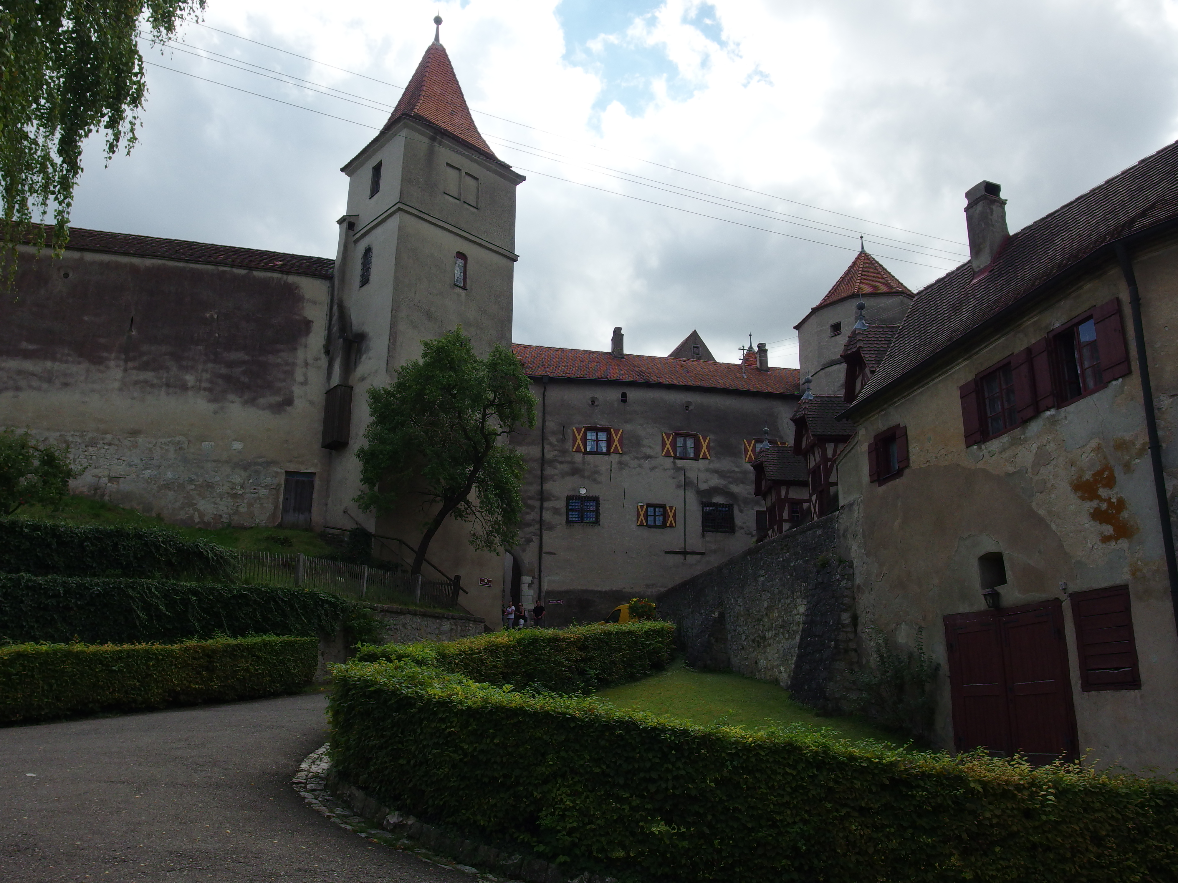 Harburg, Schloß Harburg: Weißer Turm, Inneres Tor (mit Fallgatter), rechts Rote StallungThis is a photograph of an architectural monument.